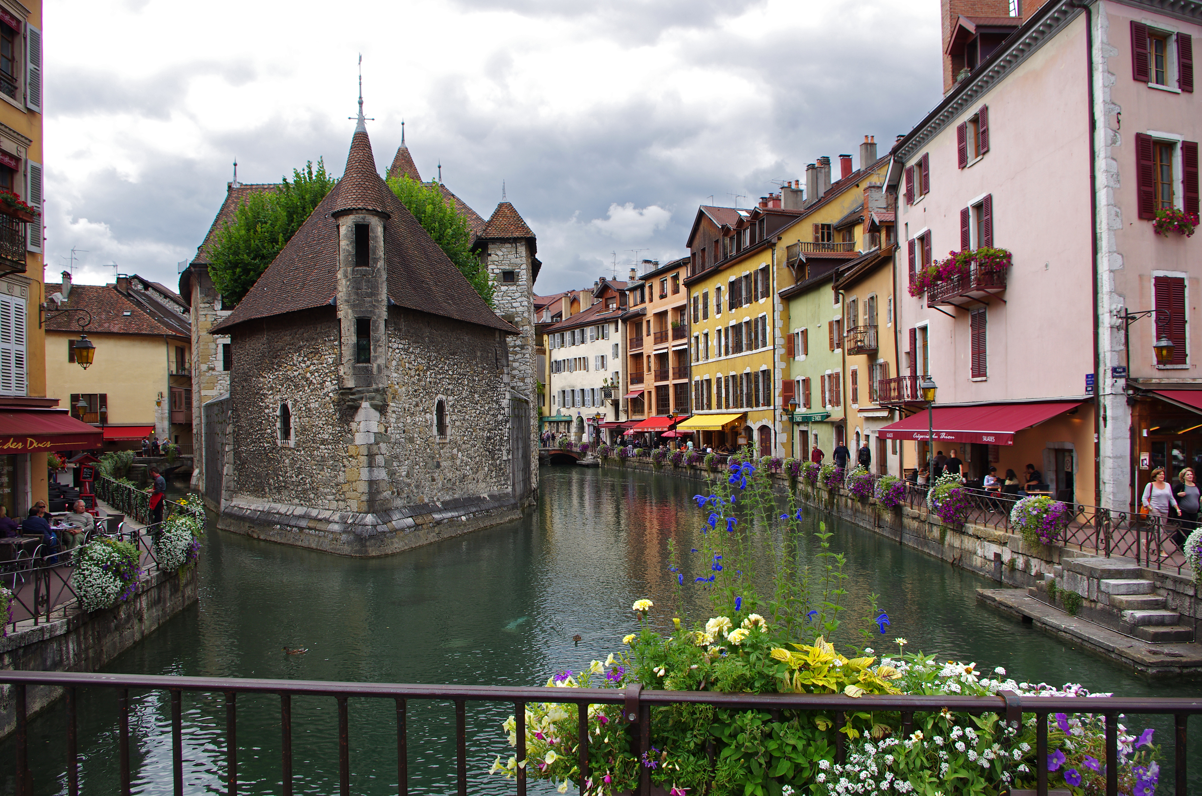 Le palais de l'Isle. C'est une maison forte datant du XI ème siècle et remaniée par la suite. Le palais de l'Isle deviendra prison, asile, chancellerie, atelier monétaire, résidence princière, palais de justice, entrepôt, caserne… Il abrite maintenant le CIAP, Centre d'interprétation de l'Architecture et du Patrimoine de Annecy.